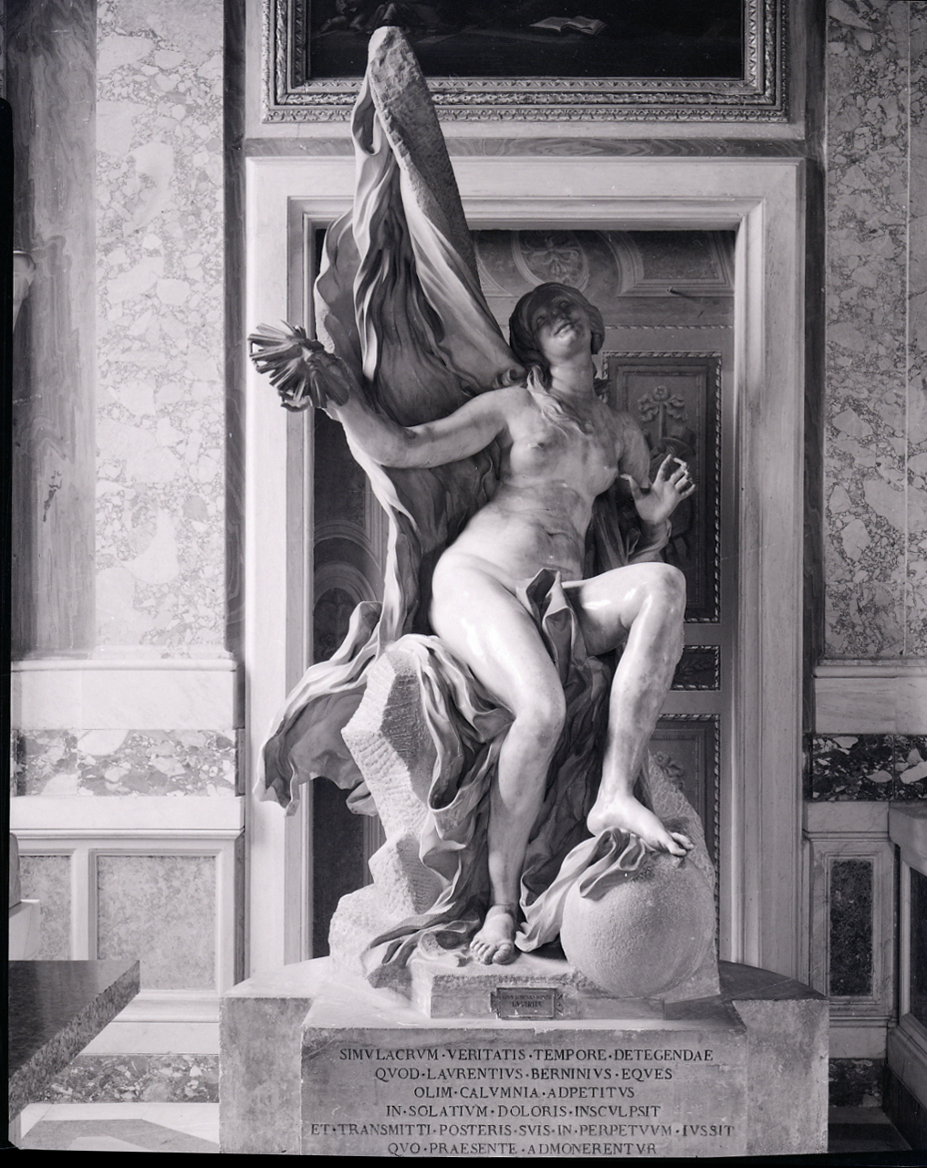 Servizio fotografico : Roma, 1980 / Paolo Monti. - Buste: 1, Fototipi: 2 : Negativo b/n, gelatina bromuro d'argento/ pellicola ; 10x12. - ((Serie costituita da 1 busta di negativi sciolti identificati con i nn.: 22366, 22367, e non identificabili singolarmente. - Sulla busta iscrizione didascalica e documentaria manoscritta a pennarello. - Sul coperchio della scatola iscrizione didascalica manoscritta a pennarello: "Duplicati". - Occasione: Documentazione per la pubblicazione: Fleming John, Honour Hugh, Pevsner Nikolaus, "Dizionario d'architettura", Torino, Einaudi, 1981. - Fonte: Fascicolo di Paolo Monti: Bernini: Architetture e Sculture (1979/06), presso Archivio Paolo Monti. - Fonte: Monografia di Fleming John, Honour Hugh, Pevsner Nikolaus: Dizionario d'architettura, Torino, Einaudi (1981)